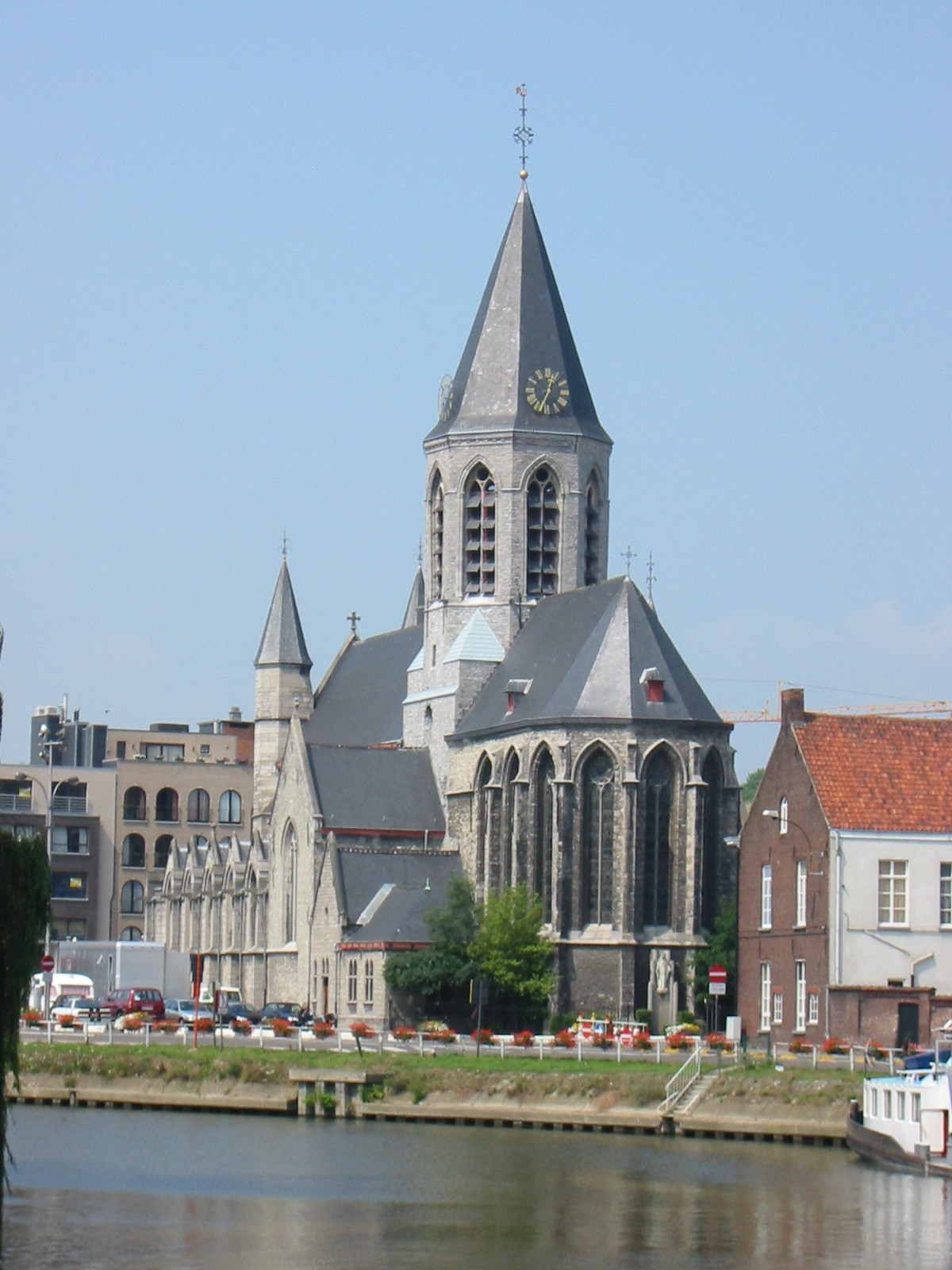 Onze lievevrouw-kerk te Deinze, Vlaanderen, België